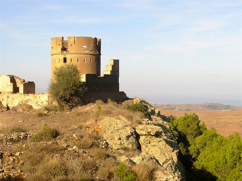 منظر لقلعة تازوضا فوق جبل كوروكو في اقليم الناظور